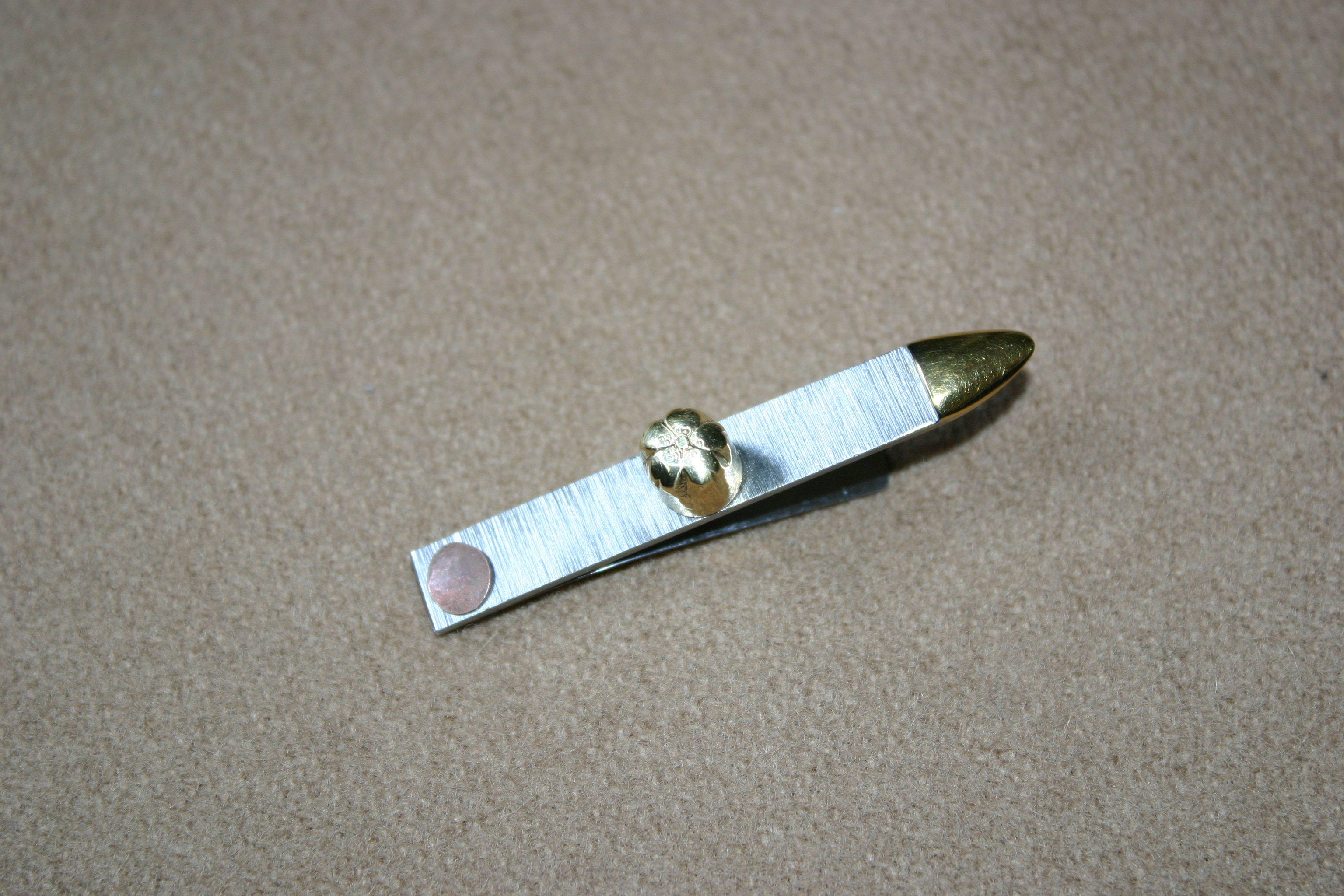 一般的な駐爪（ちゅうそう）